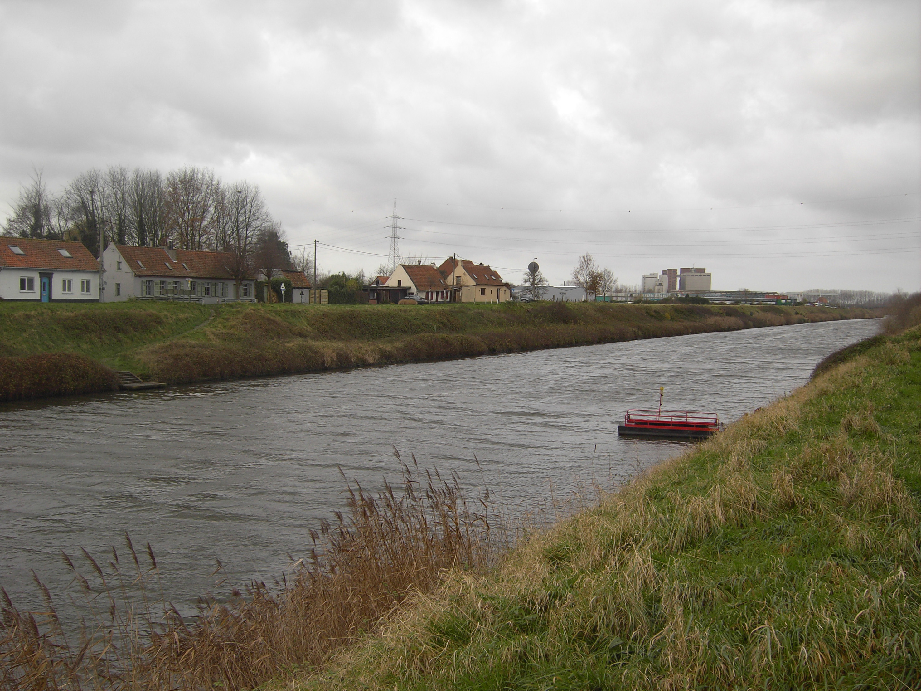 Aalter - wijk Oostmolen - Overzetbootje kanaal Gent-Brugge